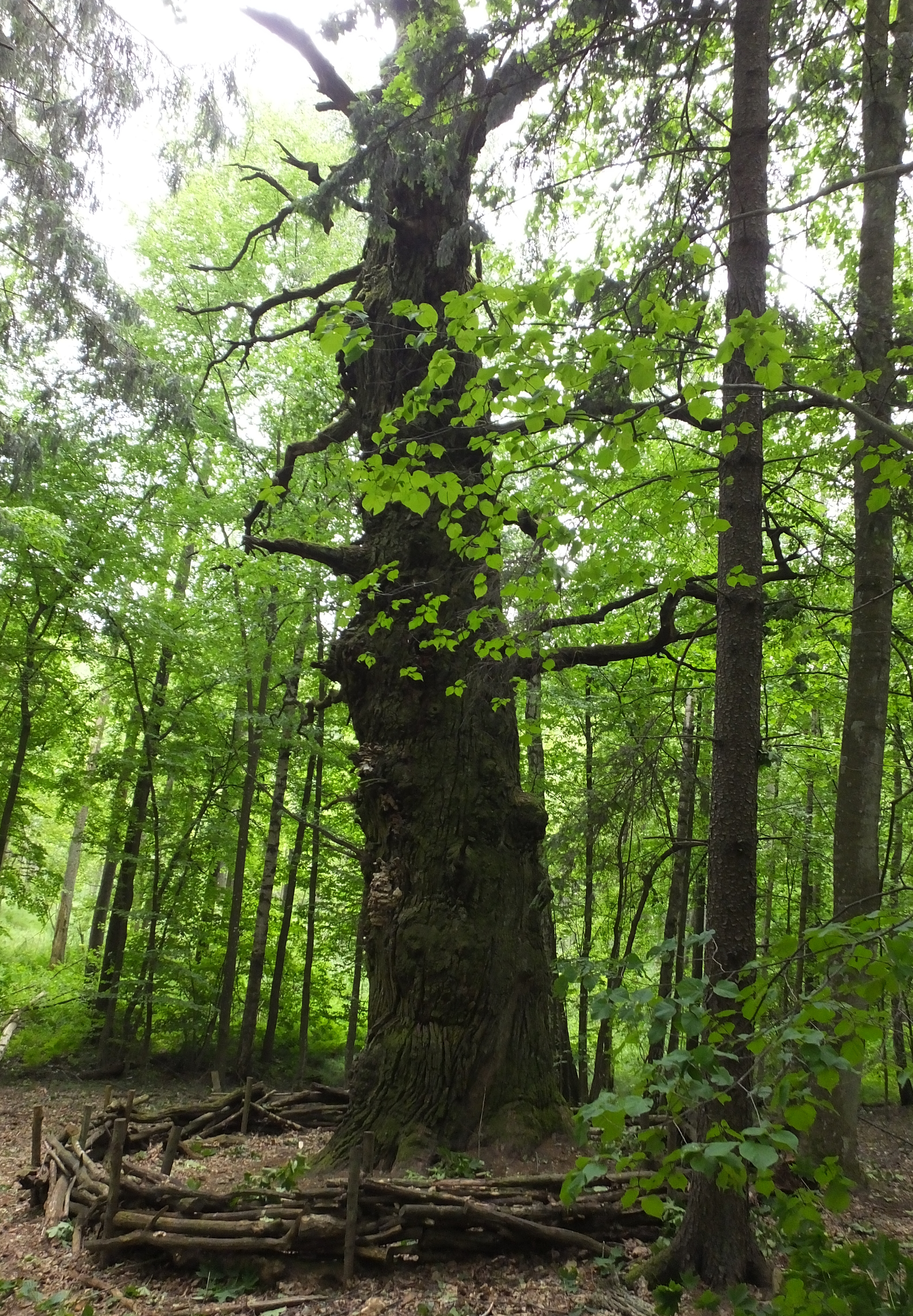 Pomnik przyrody "Dąb Perun/Perkun" – ścieżka dydaktyczna "Śladami Gałczyńskiego", nadleśnictwo maskulińskie, okolice leśniczówki Pranie.